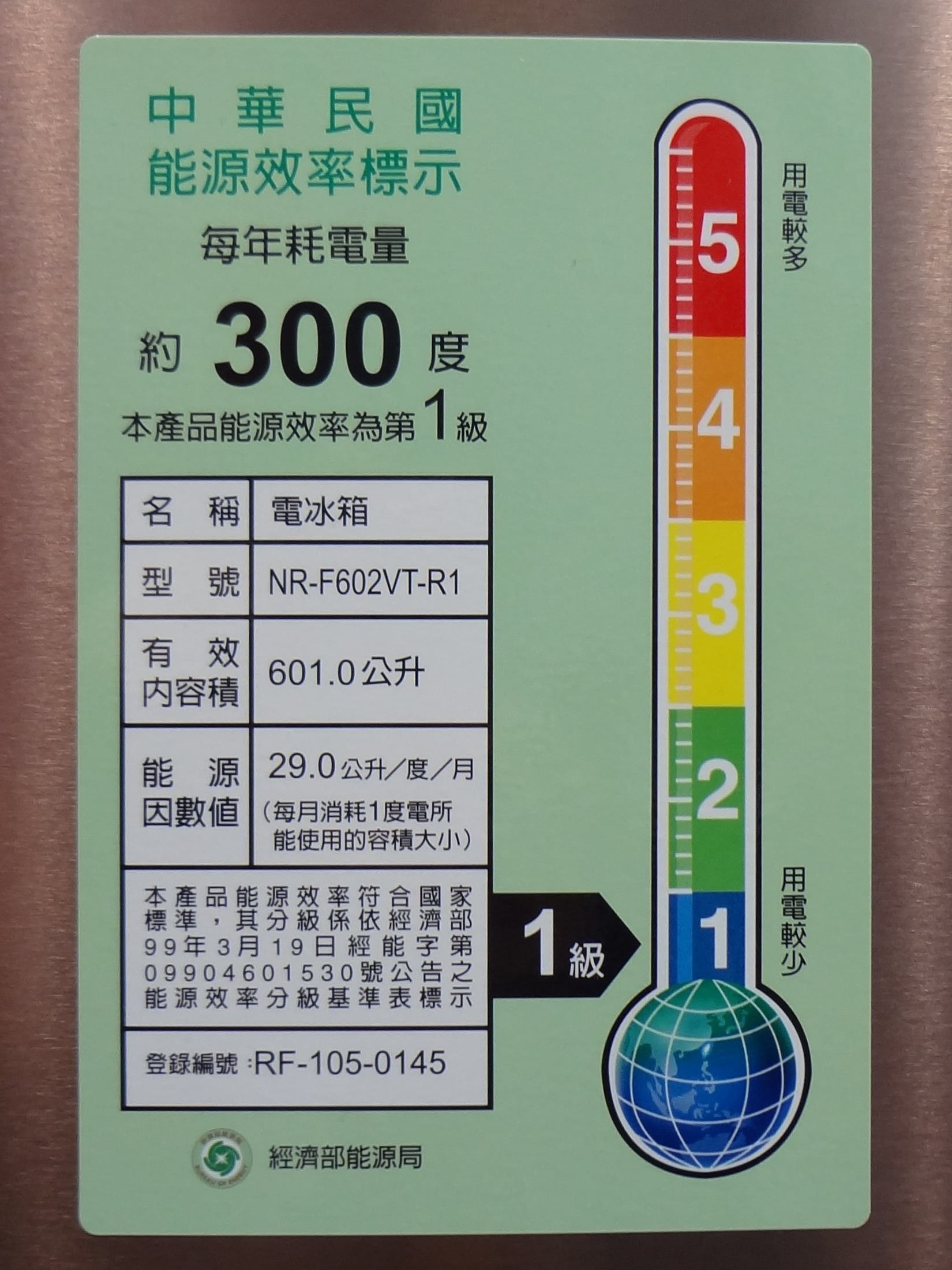 台灣松下電器Panasonic電冰箱NR-F602VT-R1正面右上方貼的中華民國經濟部能源局能源效率標示貼紙。